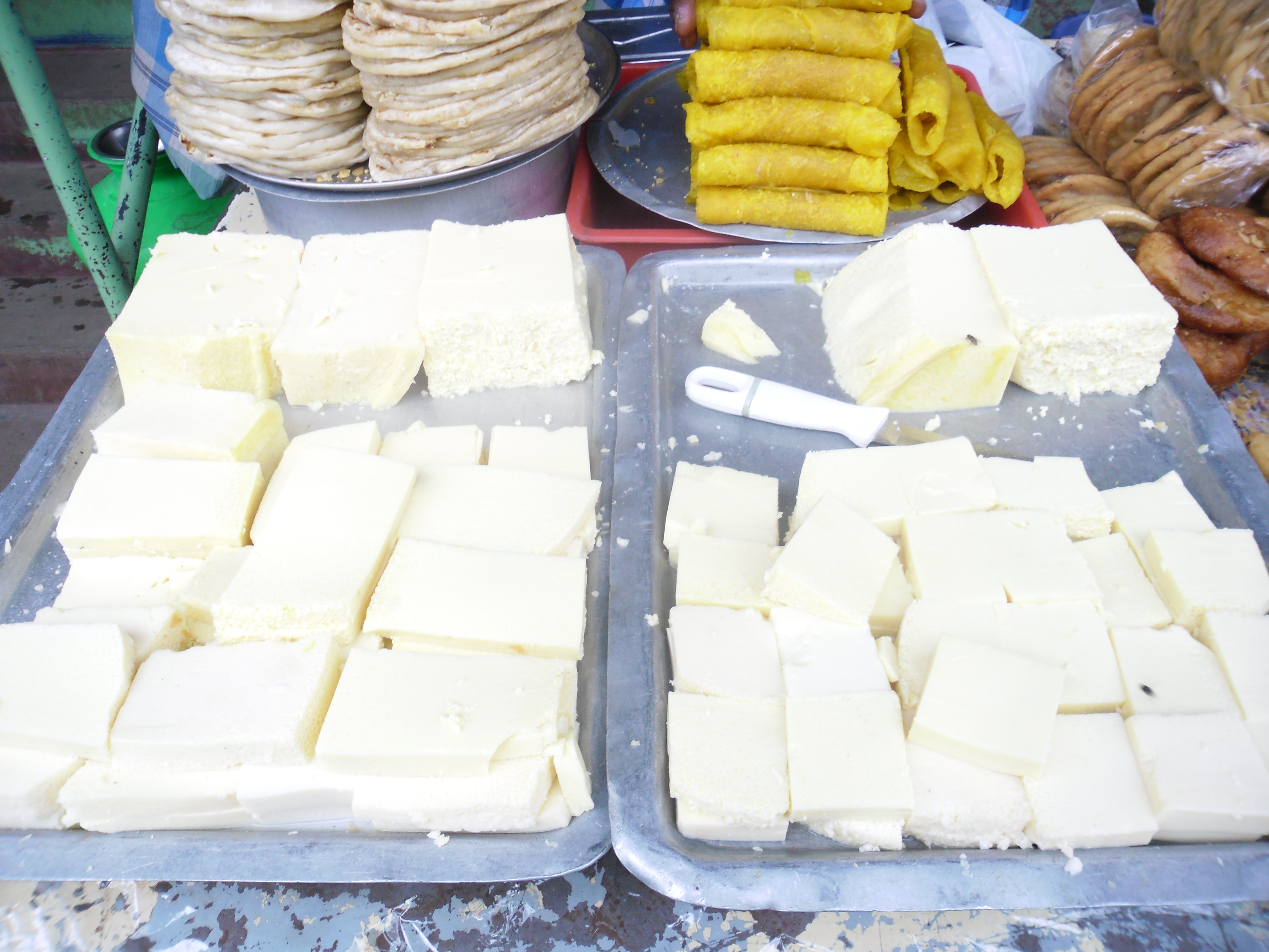 சீம்பால் கட்டிகள்